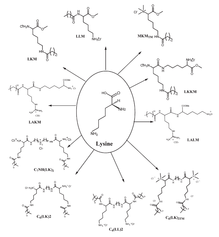 Tensioactivos catiónicos derivados del aminoácido lisina